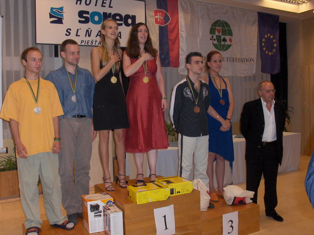 Majstri sveta v bridži v kategórii juniori za rok 2006. Vpravo Jose Damiani - prezident WBF.